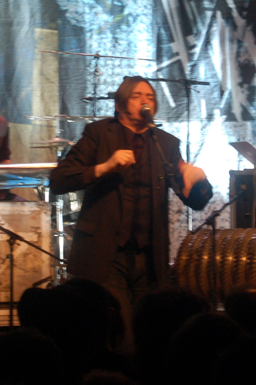 concerto de Blixa Bargeld coa Einstürzende Neubauten